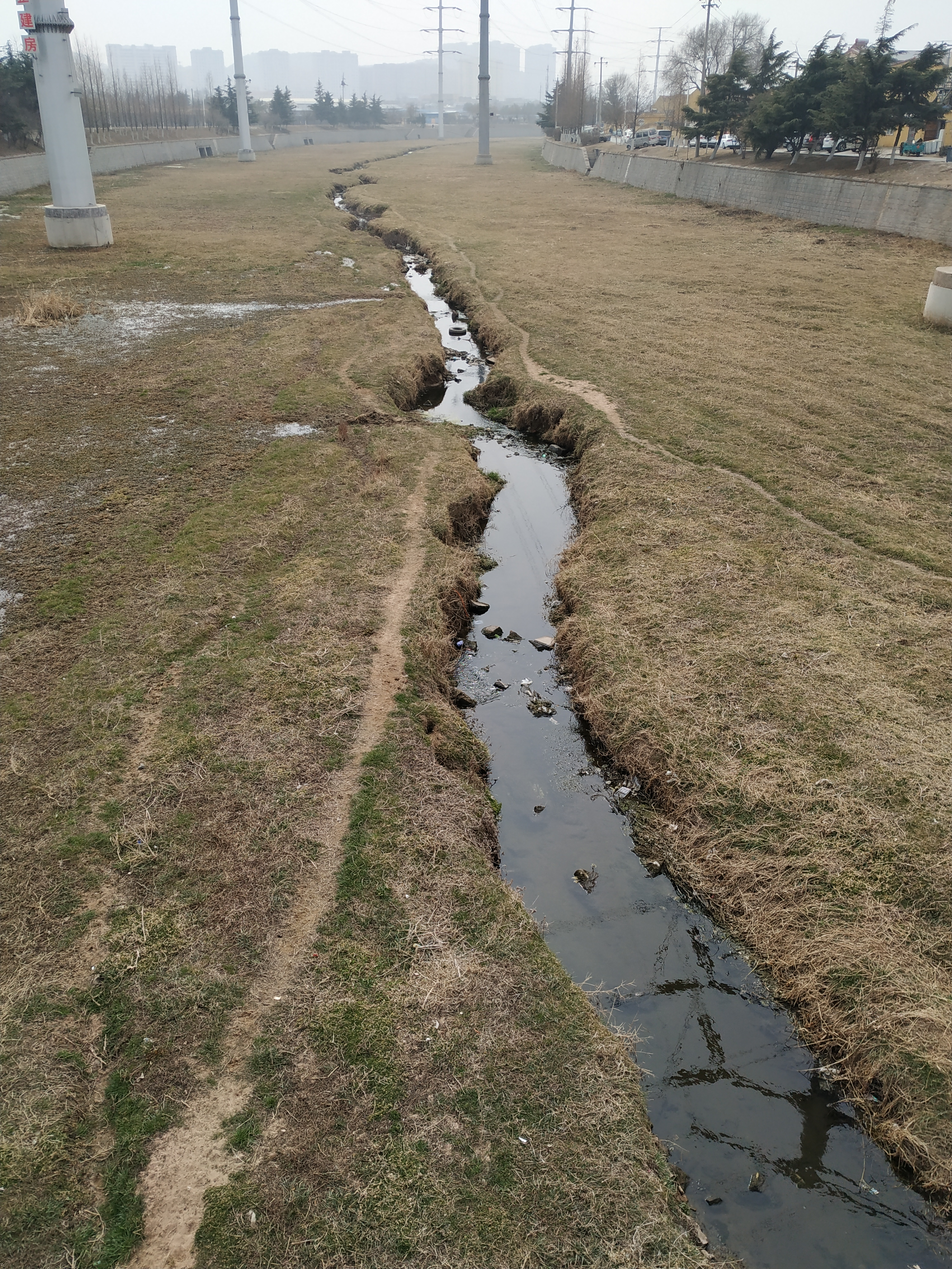 中文（中国大陆）: 崂山张村河